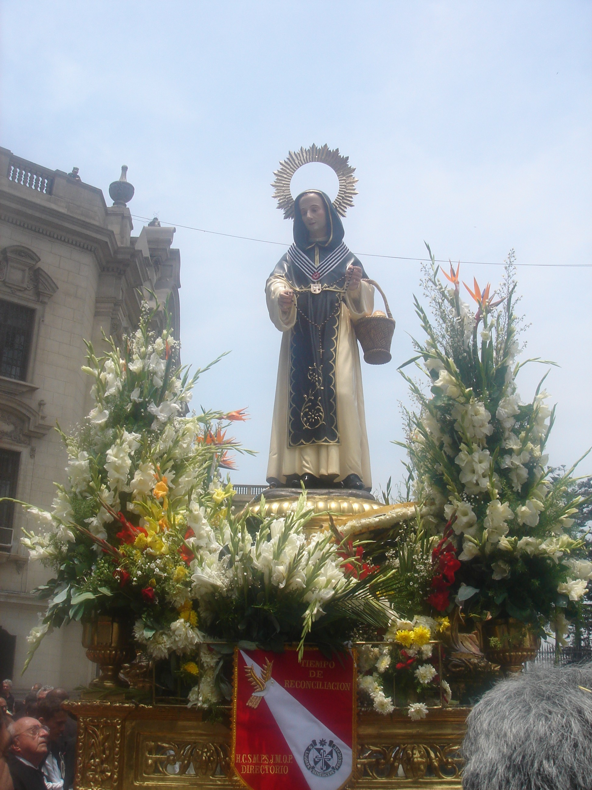 Procesión de San Juan Masías en Lima, Perú.